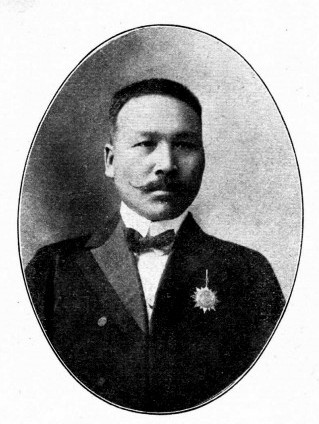 中文（台灣）: 中華民國國會議員